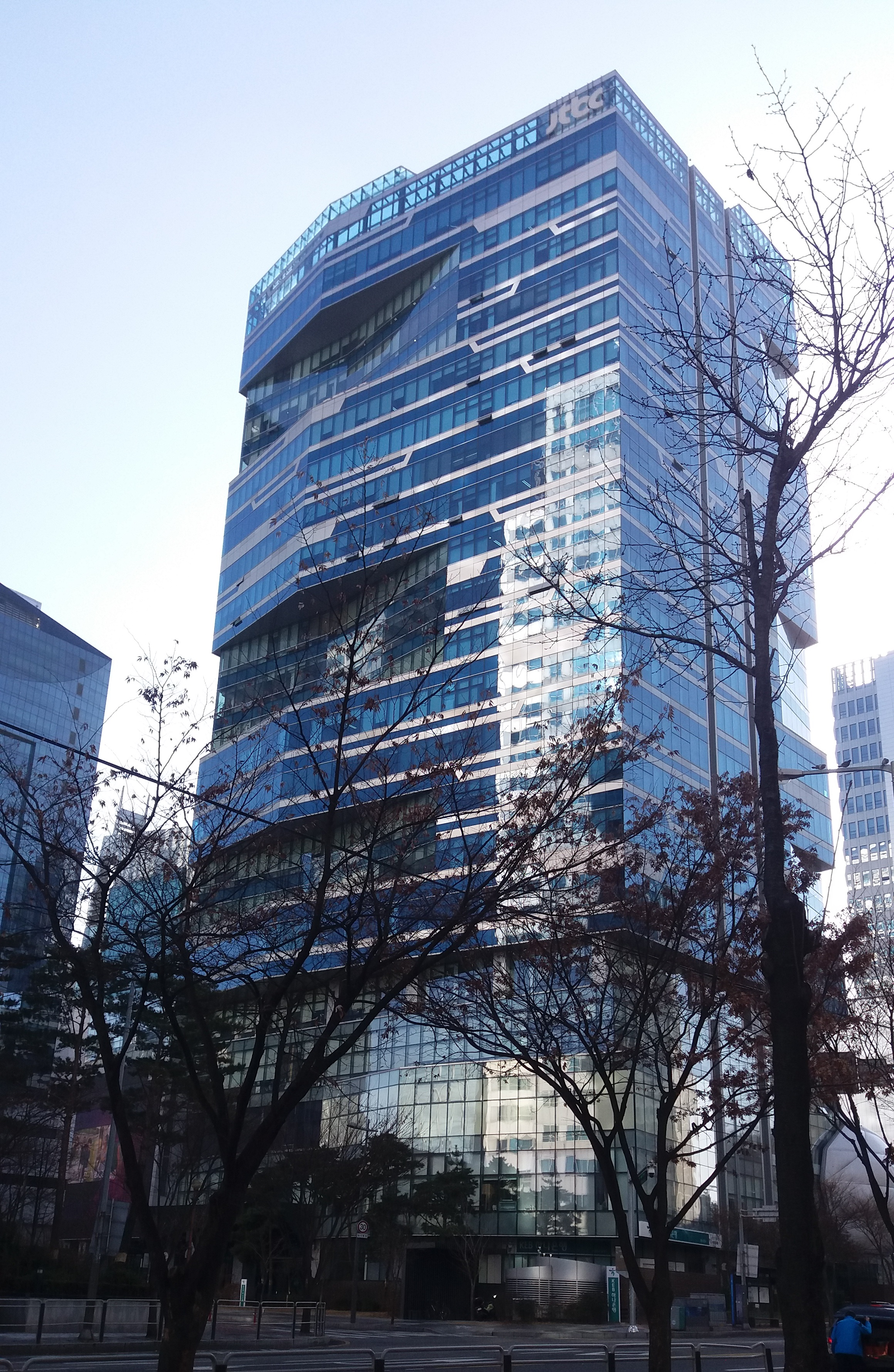 JTBC 사옥